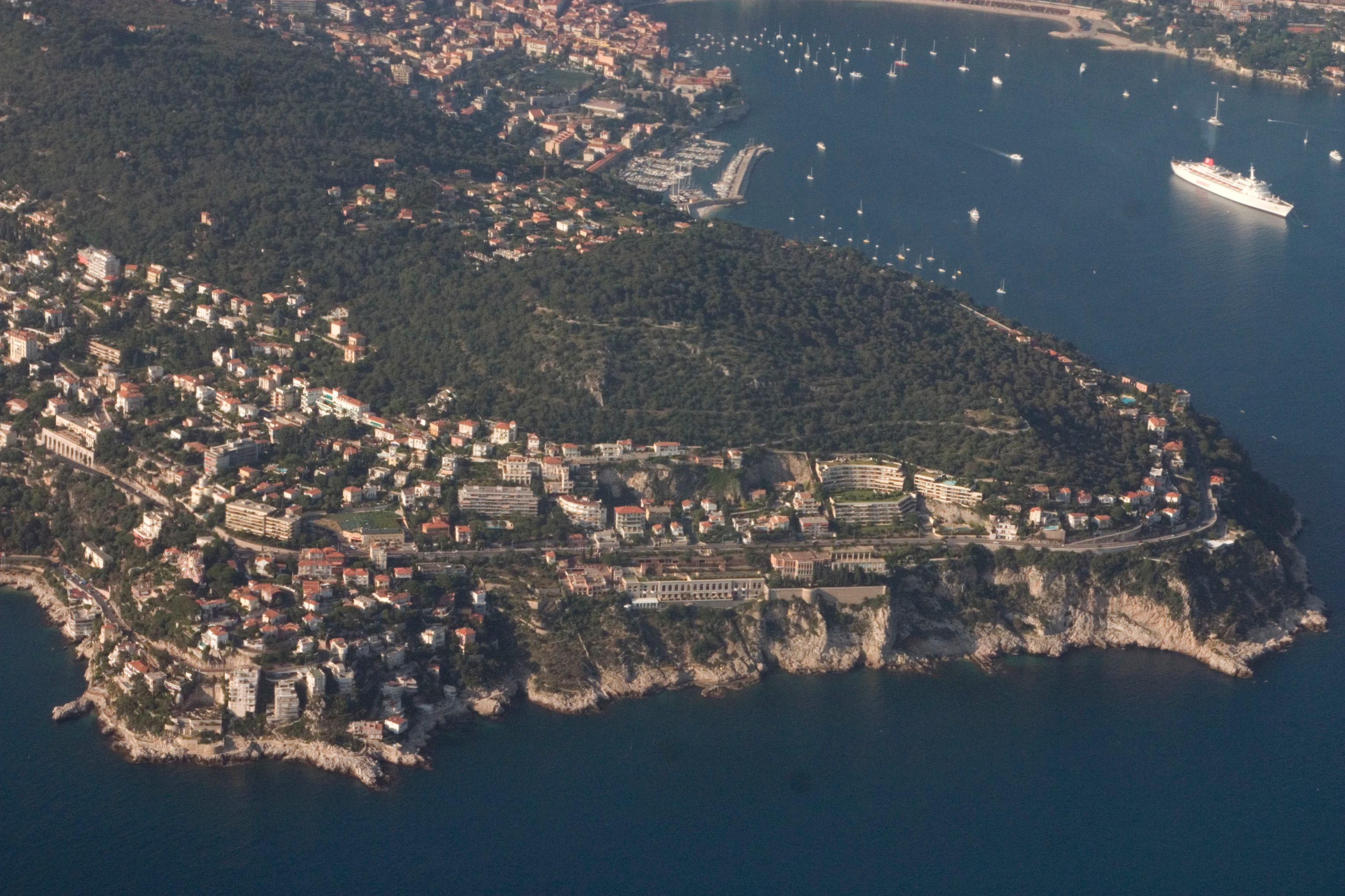 Le Cap de Nice et, à droite, la Rade de Villefranche (Alpes Maritimes)